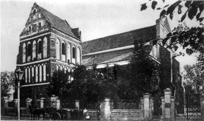 Kościół farny św. Michała w Łomży